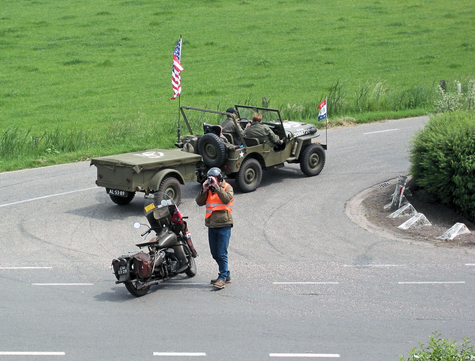 Keep them rolling